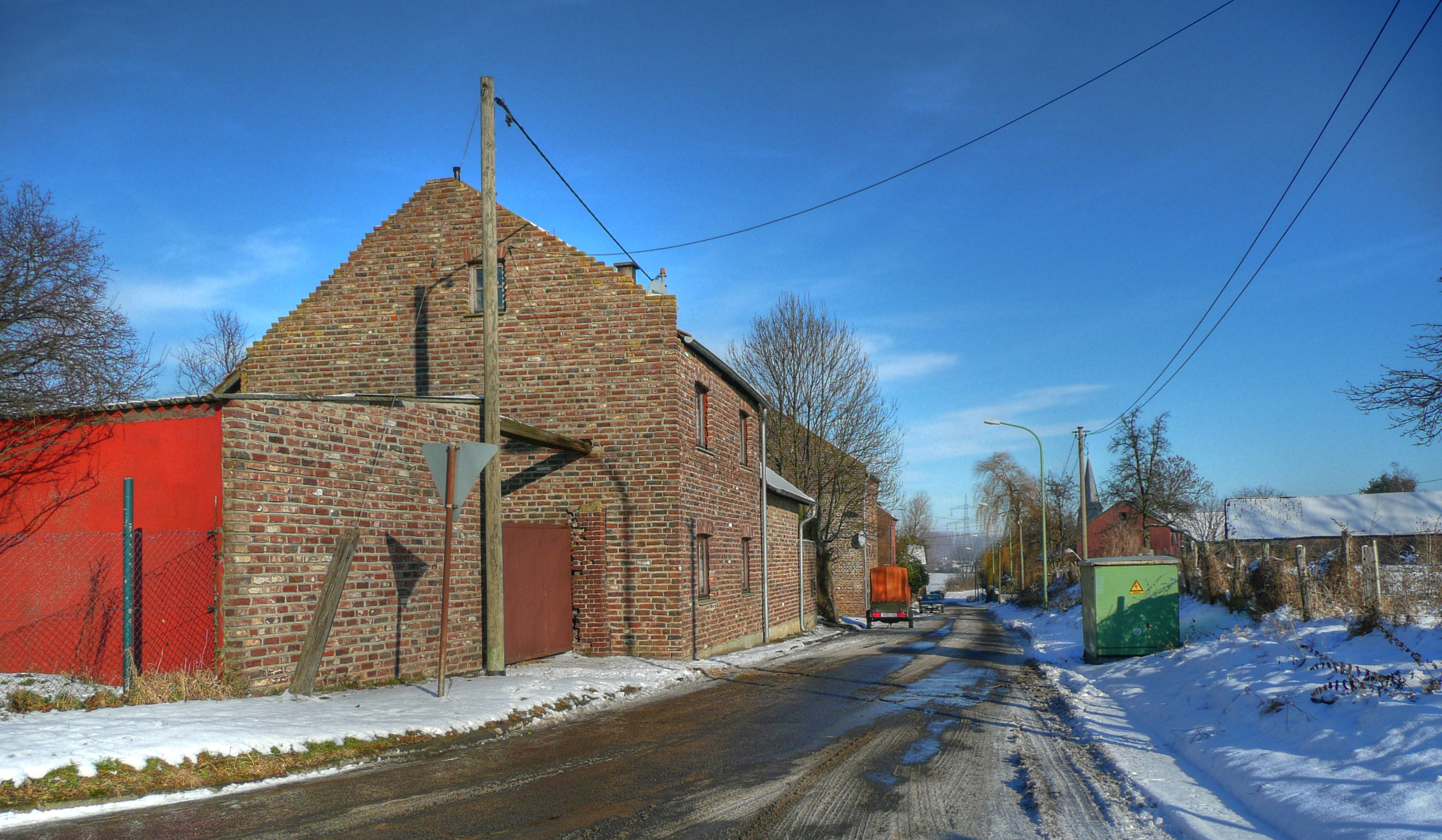 Vilvenich (zu Pier zugehörig)